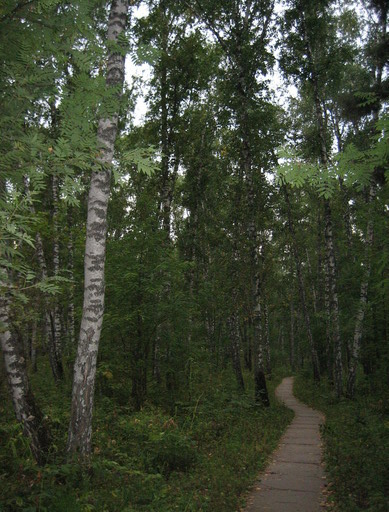 Akademgorodok birch-wood near Krasnoyarsk